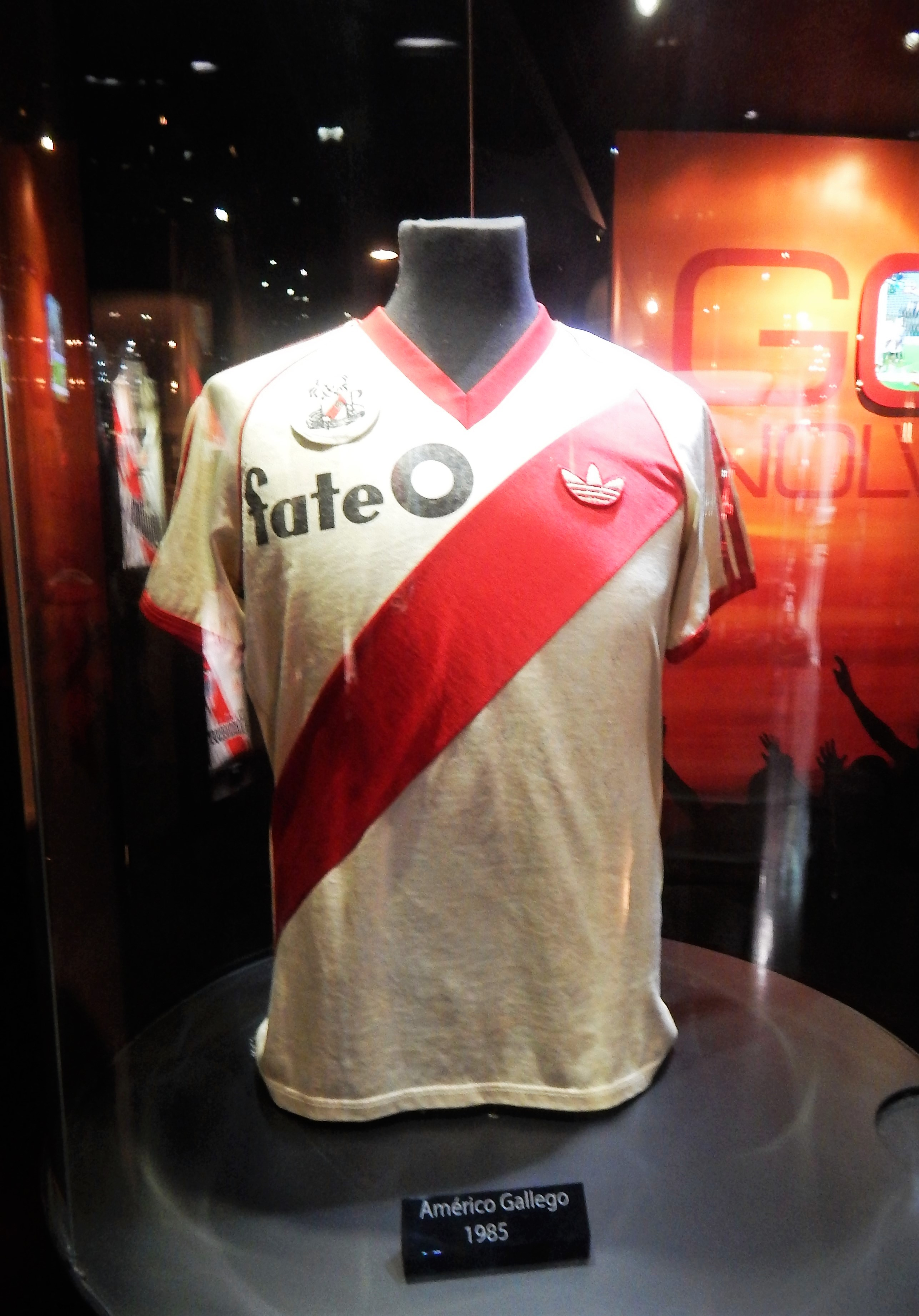 Camiseta de Américo Gallego del Club Atlético River Plate de 1985, echa por Adidas, en el Museo River Plate.